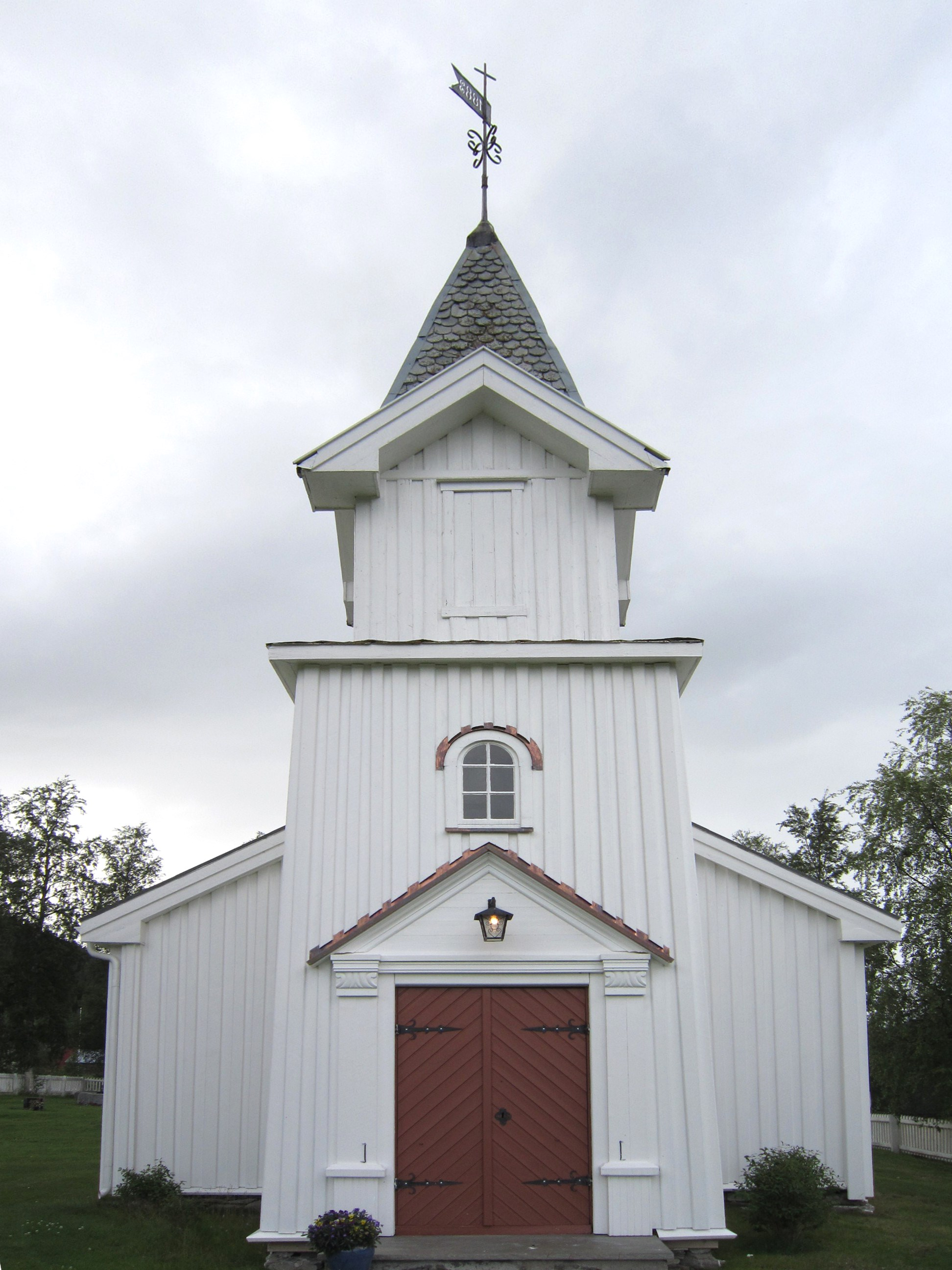 Brydalen kirke (Tynset kommune)